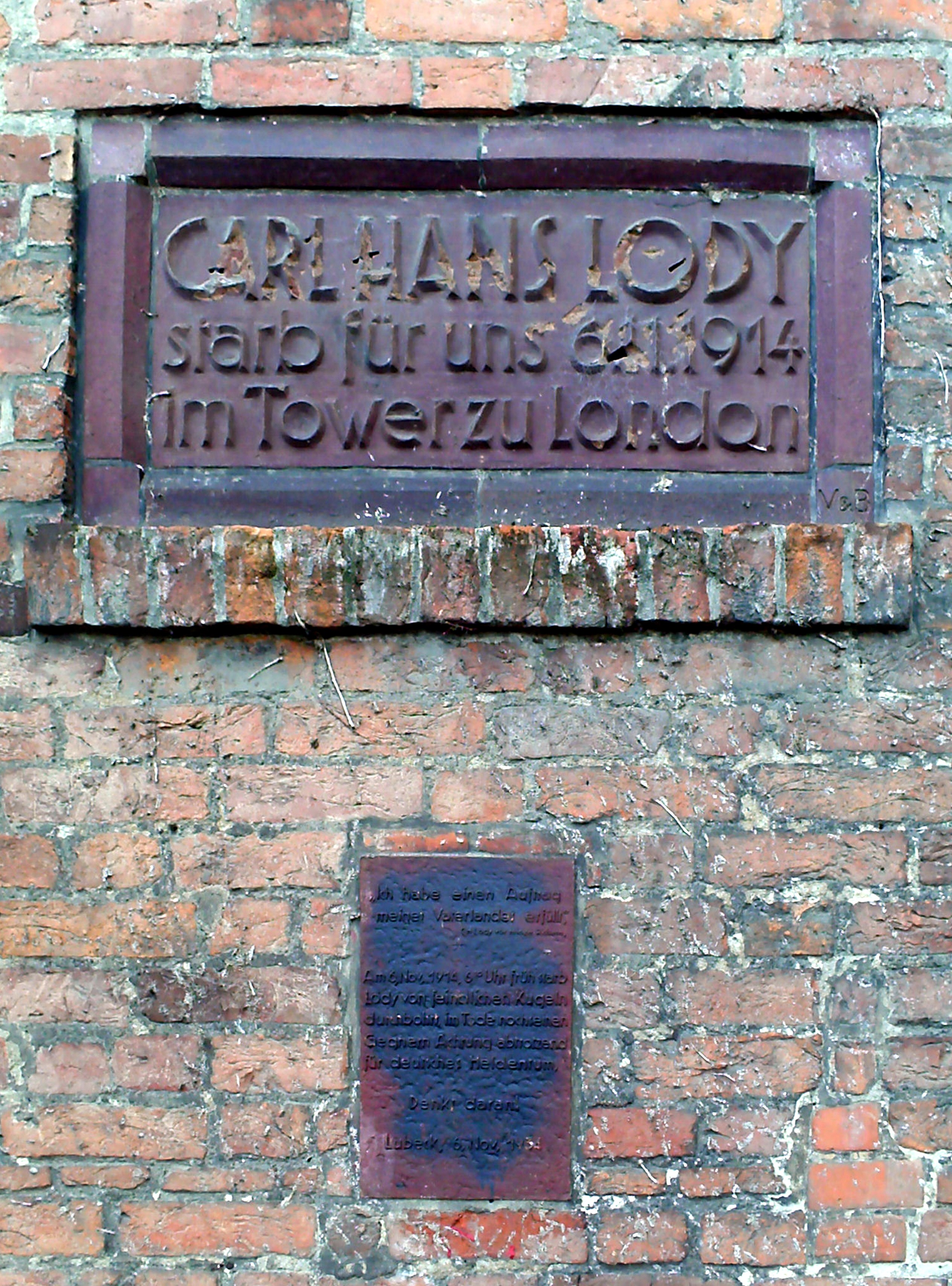 Gedenktafel für Carl Hans Lody am Lübecker Burgtor gefertigt von Otto Mantzel.